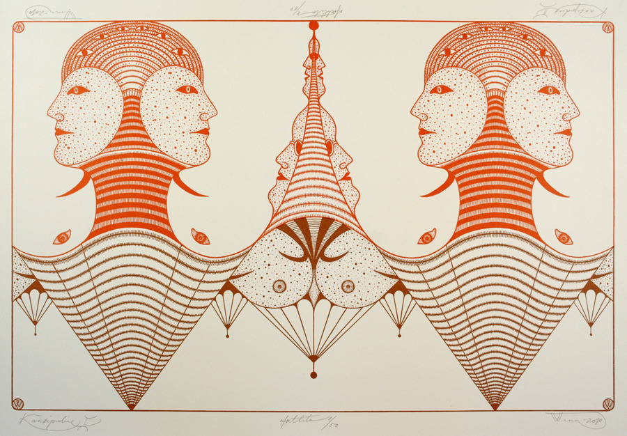 graphic art by Vello Vinn